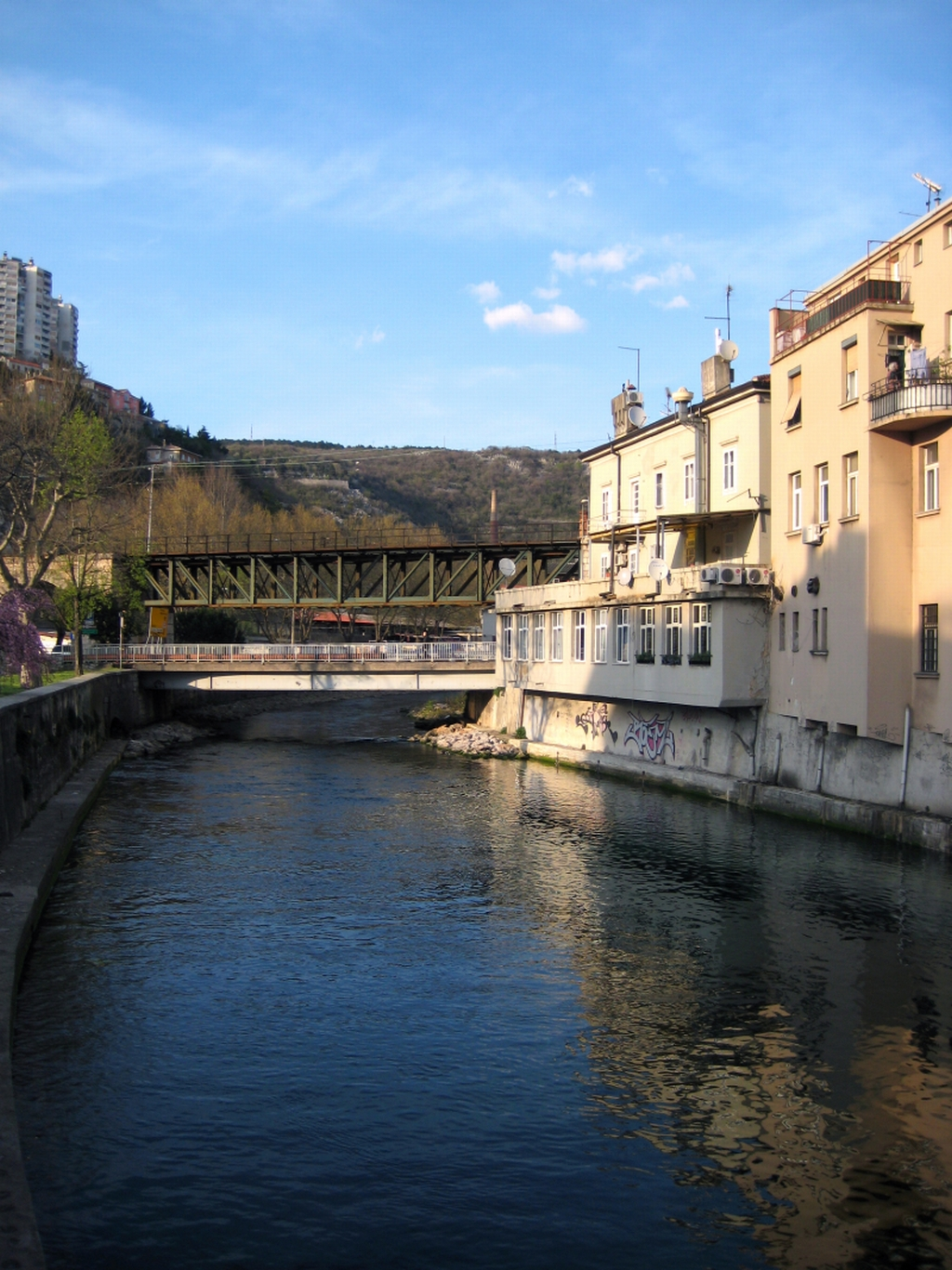 Rječina u Rijeci